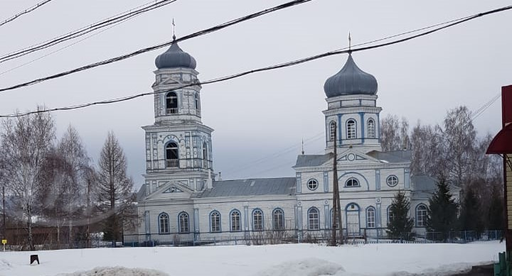 Никольский храм в Сыреси, Порецкий район, Чувашская республика